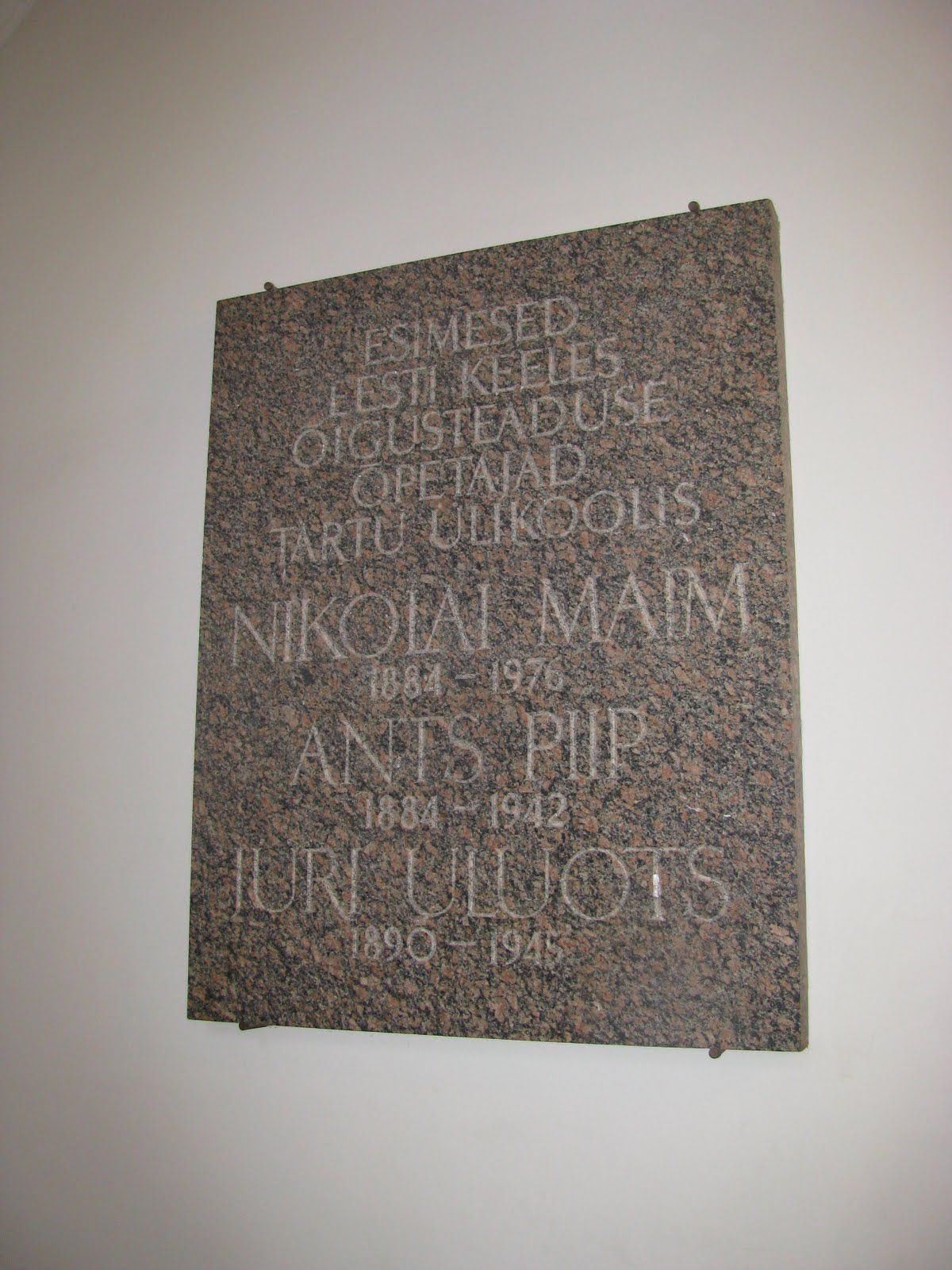 Nikolai Maimu, Ants Piibu ja Jüri Uluotsa mälestustahvel Tartu Ülikooli peahoones.